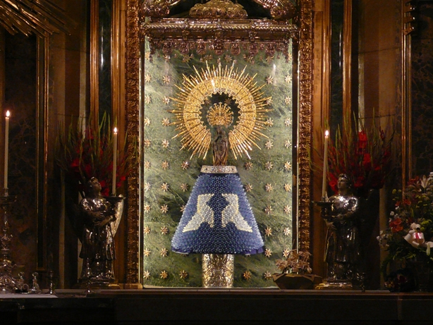 Manto del Grupo Zaragozano de Papiroflexia sobre la Virgen del Pilar de Zaragoza.